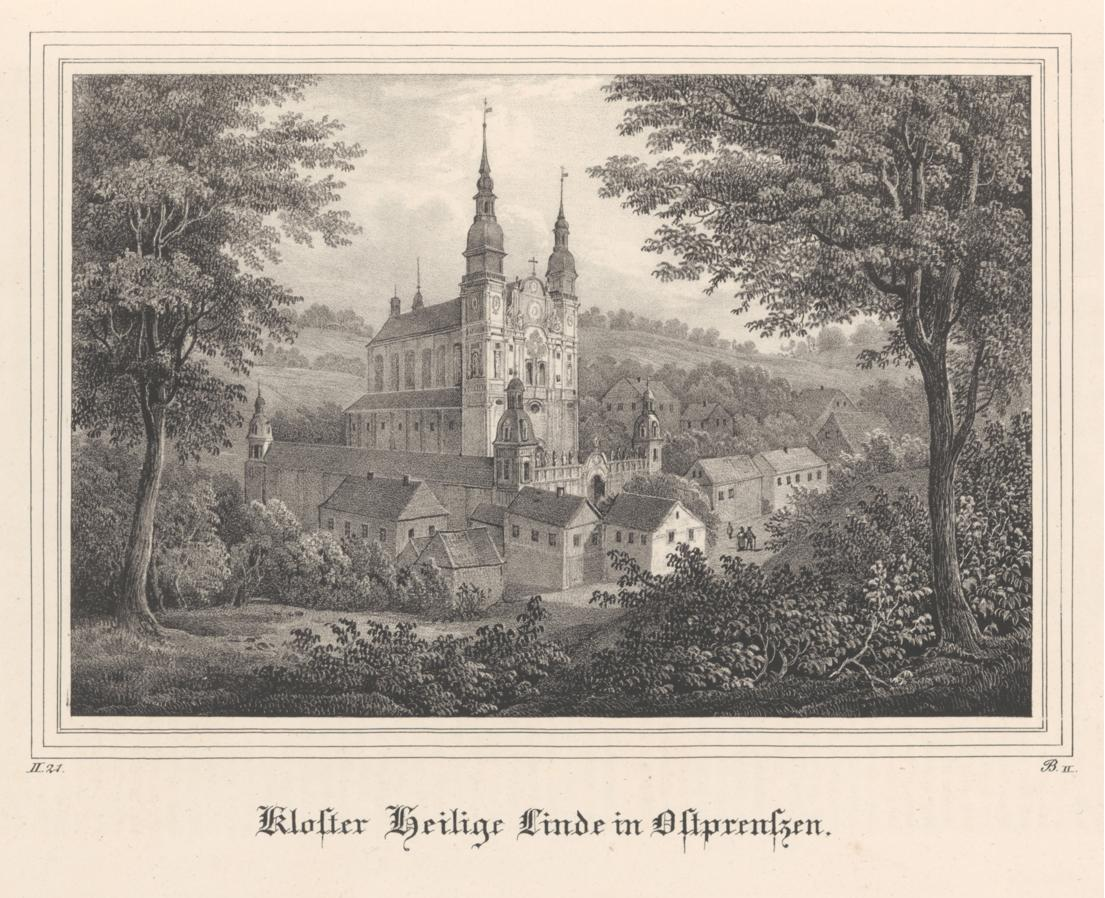 Ansicht Kloster Heiligelinde